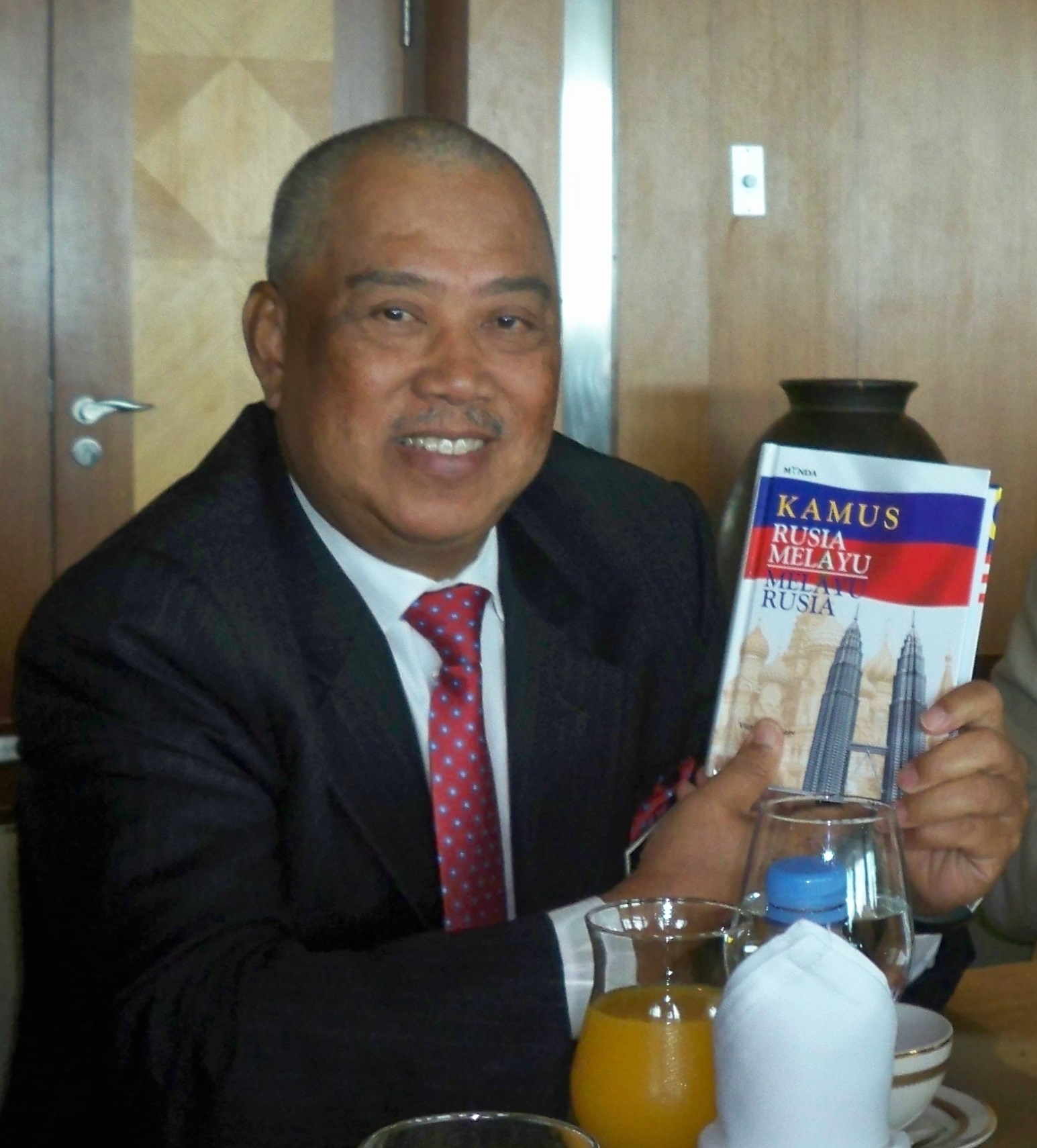 Tan Sri Muhyiddin Yassin dengan Kamus BM BR